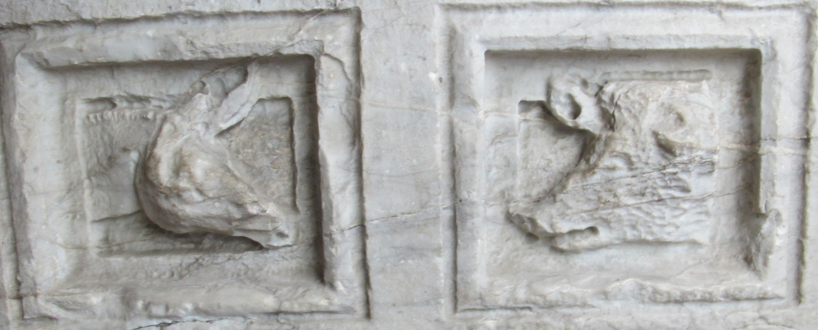 Taglia di giovanni pisano, frammenti di graduale dal duomo di pisa, fine xiii sec.